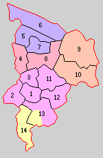 福島県石川郡の町村。